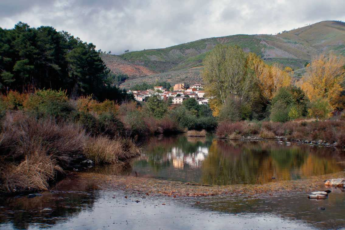 Sauceda en otoño, desde paraje del Barrial.